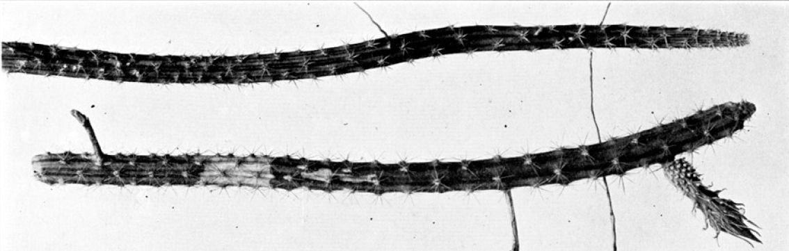 Selenicereus vagans (Hylocereeae; Cactaceae; Planta) Nathaniel Lord Britton és Joseph Nelson Rose "The Cactaceae" c. könyvéből